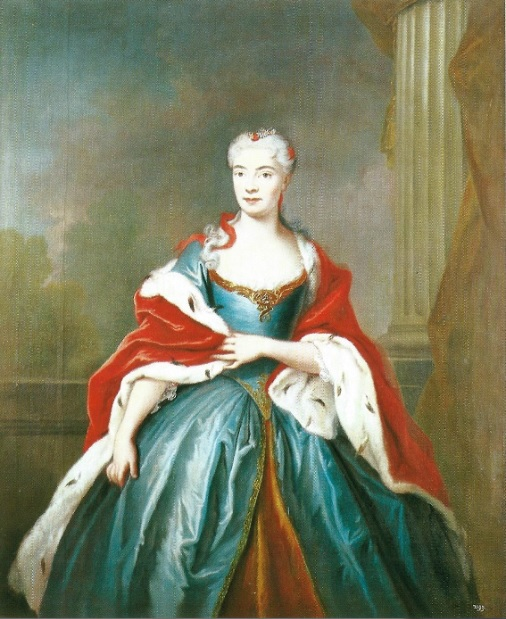 Portret Tekli Róży Wiśniowieckiej